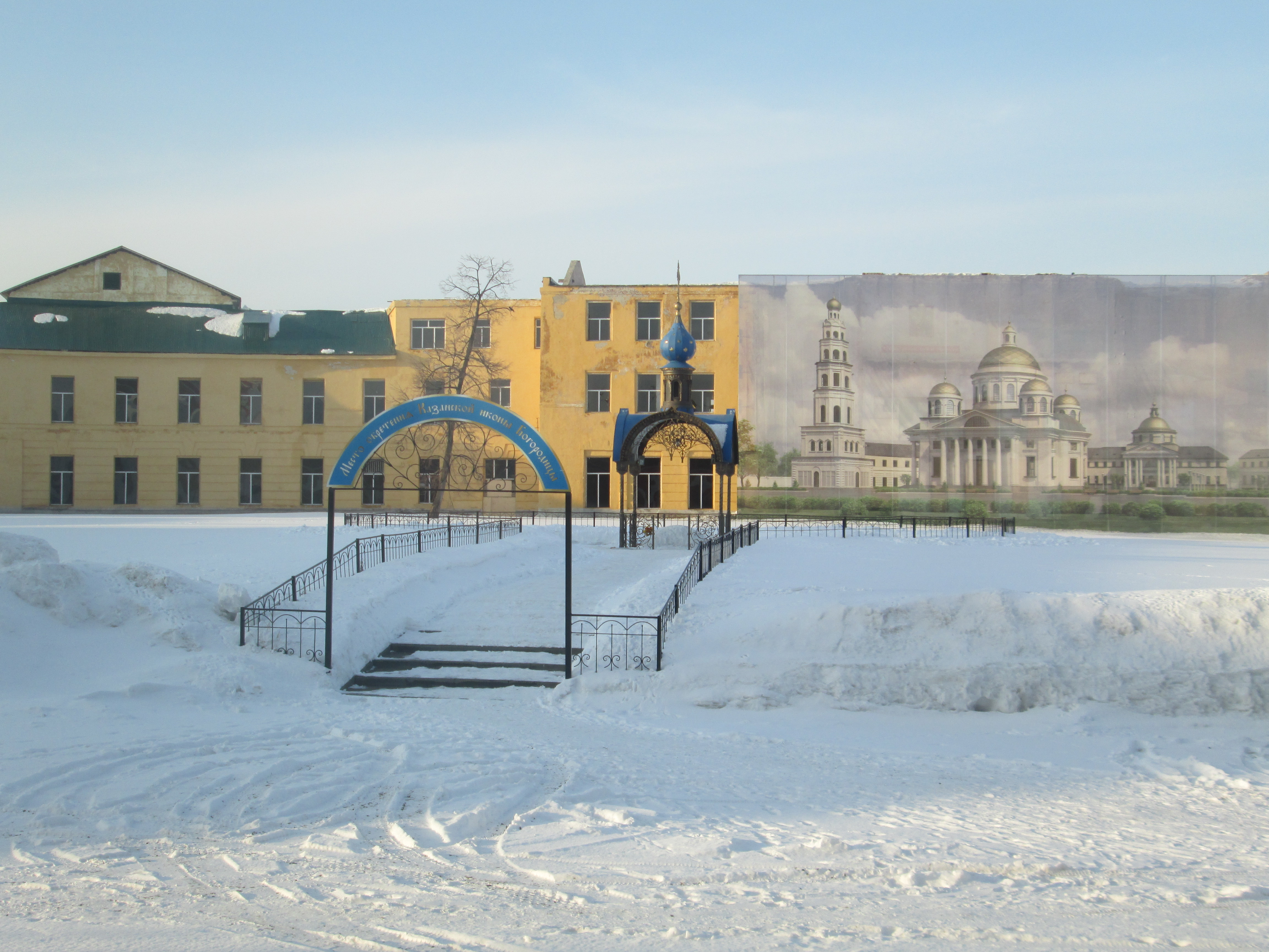 Казанский Богородицкий монастырь. Место обретения Казанской иконы Божией Матери